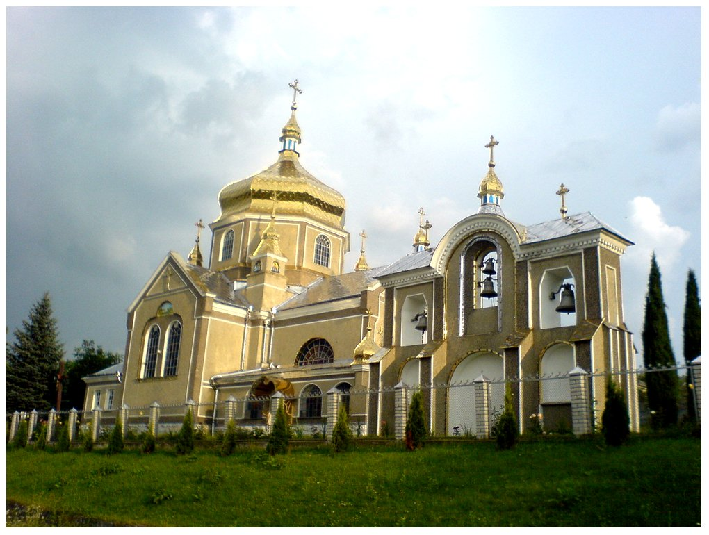 Греко-католицька церква св. Миколая: Вигляд з вул. Г.Яхимовича